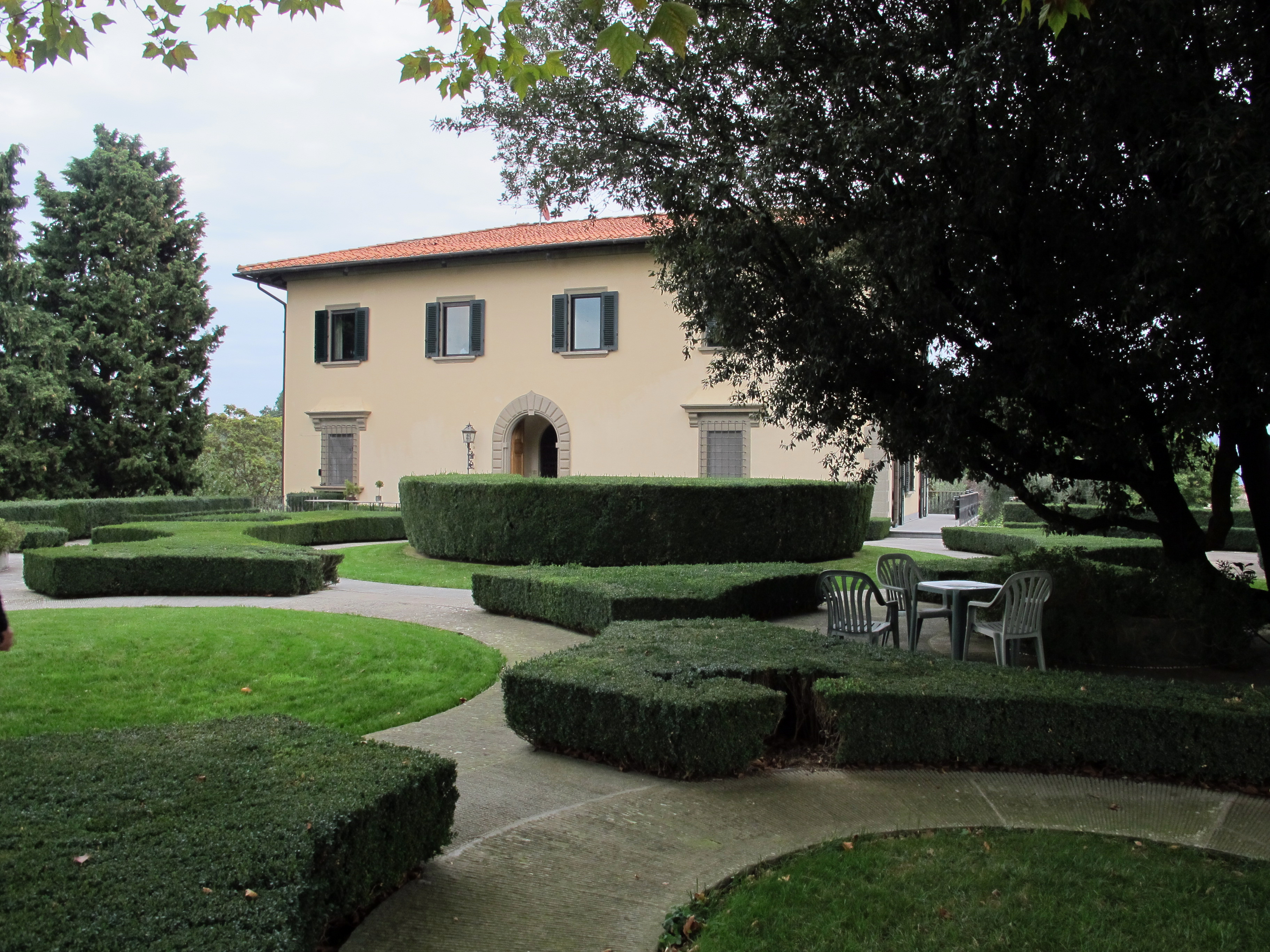 Villa Il Roseto (Firenze)